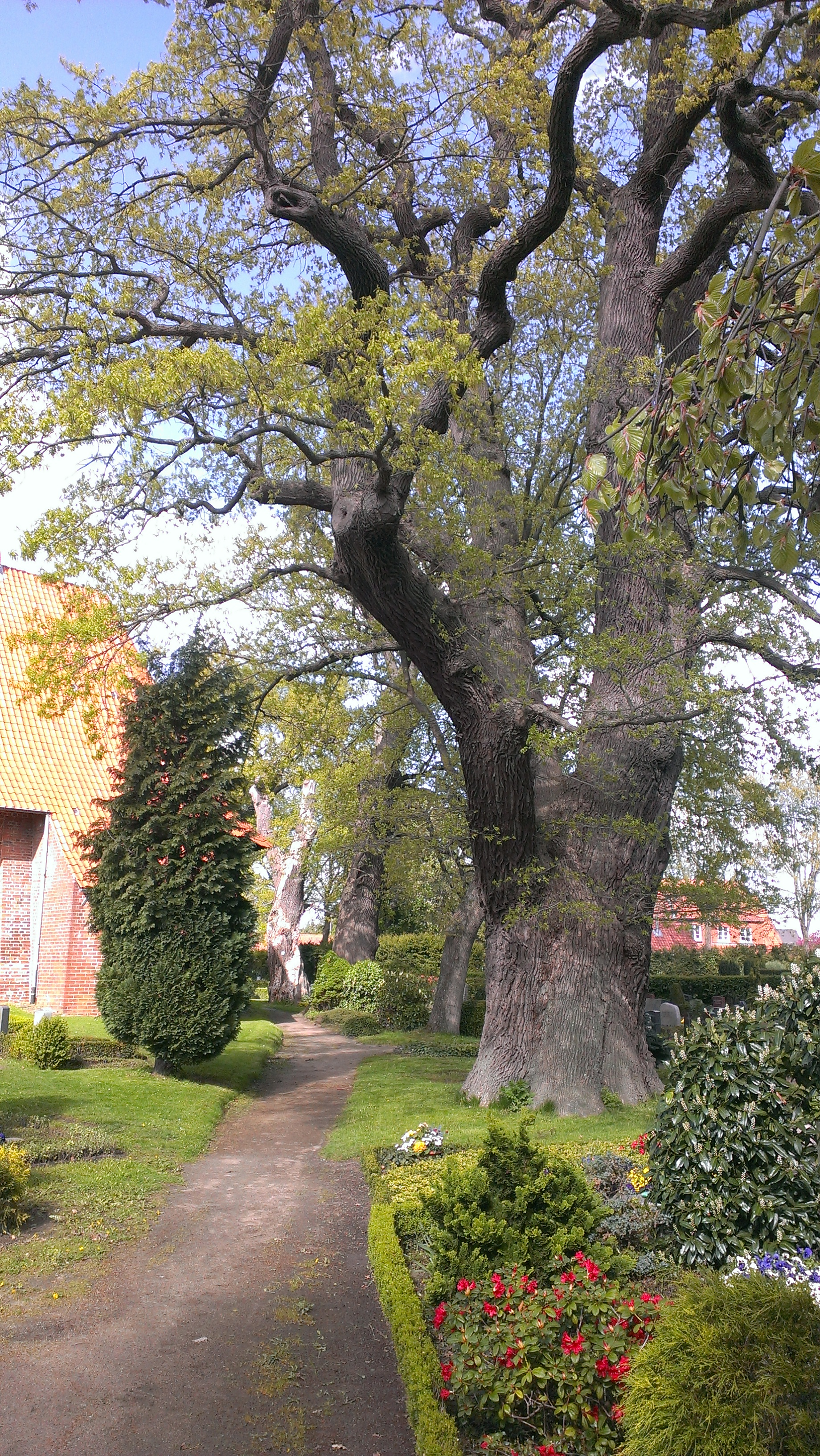 Eiche (Quercus sp.) auf dem Geniner Friedhof, Lübeck, Naturdenkmal